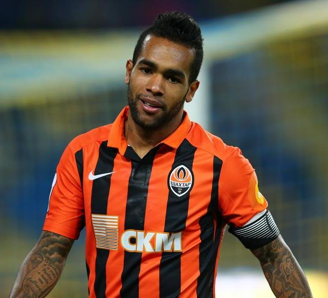 Алекс Тейшейра під час виступів за Шахтар